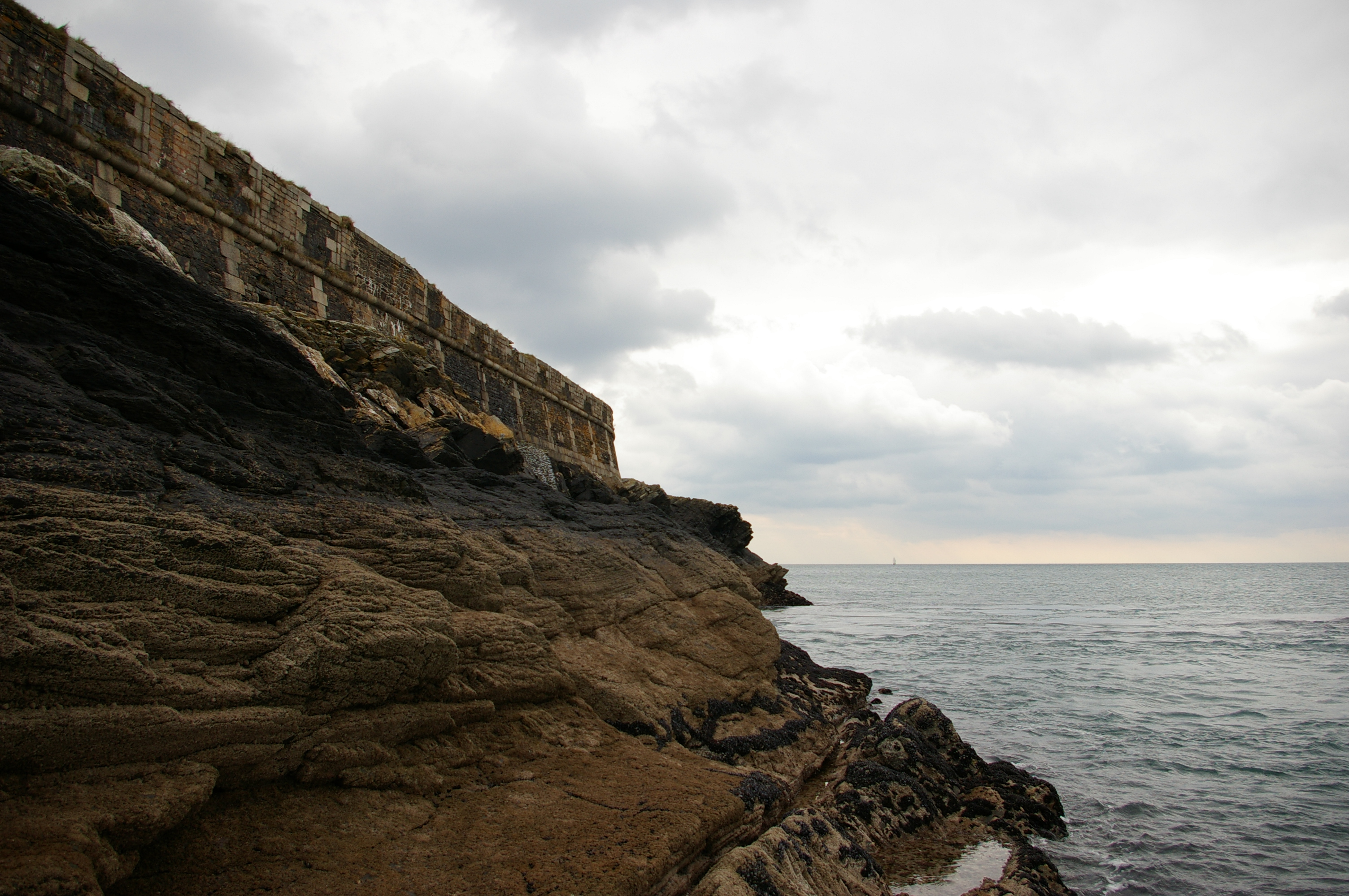 Vue sur l’escarpe et les embrasures, du niveau de l’eau à marée basse.